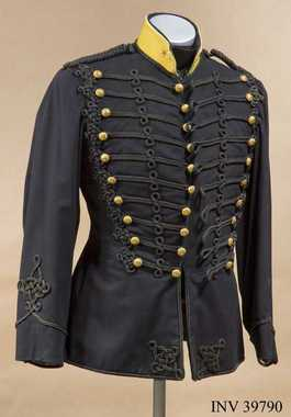 Attila m/1873 Identifikationsnr: AM.039790 Samling: Armémuseum